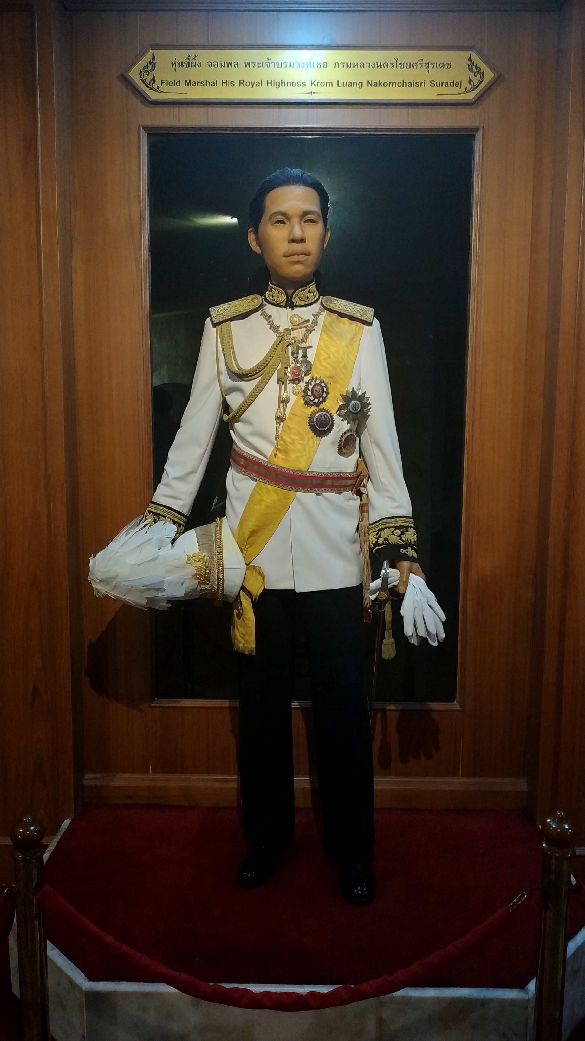 พระบรมรูปหุ่นขี้ผึ้งเต็มองค์ จอมพล พระเจ้าบรมวงศ์เธอ พระองค์เจ้าจิรประวัติวรเดช กรมหลวงนครไชยศรีสุรเดช ในฉลองพระองค์เต็มยศนายทหารบกแห่งกองทัพบกไทย จัดแสดงที่อาคารอนุสรณ์สถานแห่งชาติ ตำบลคูคต อำเภอลำลูกกา จังหวัดปทุมธานี